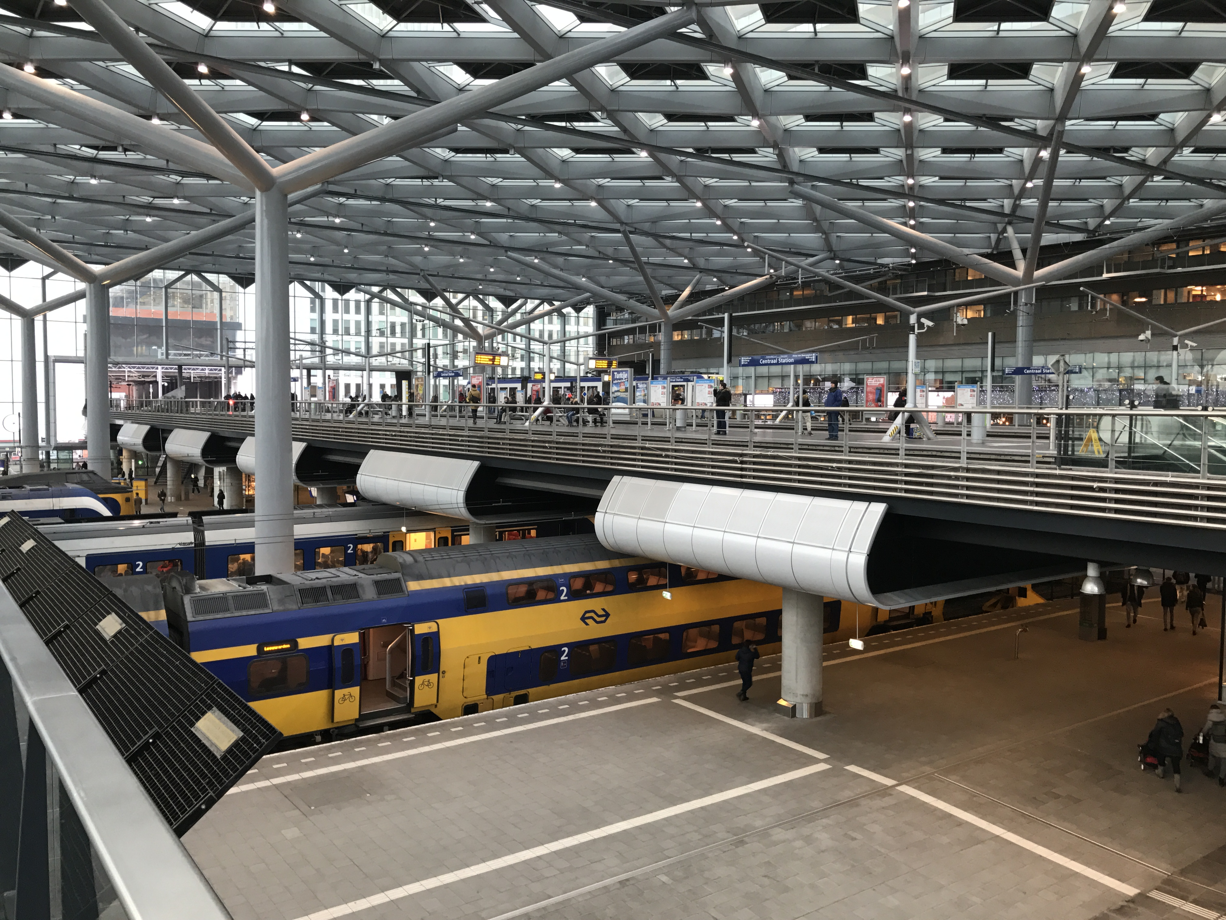 Het tramplatform met daaronder de treinen van station Den Haag Centraal in 2017.